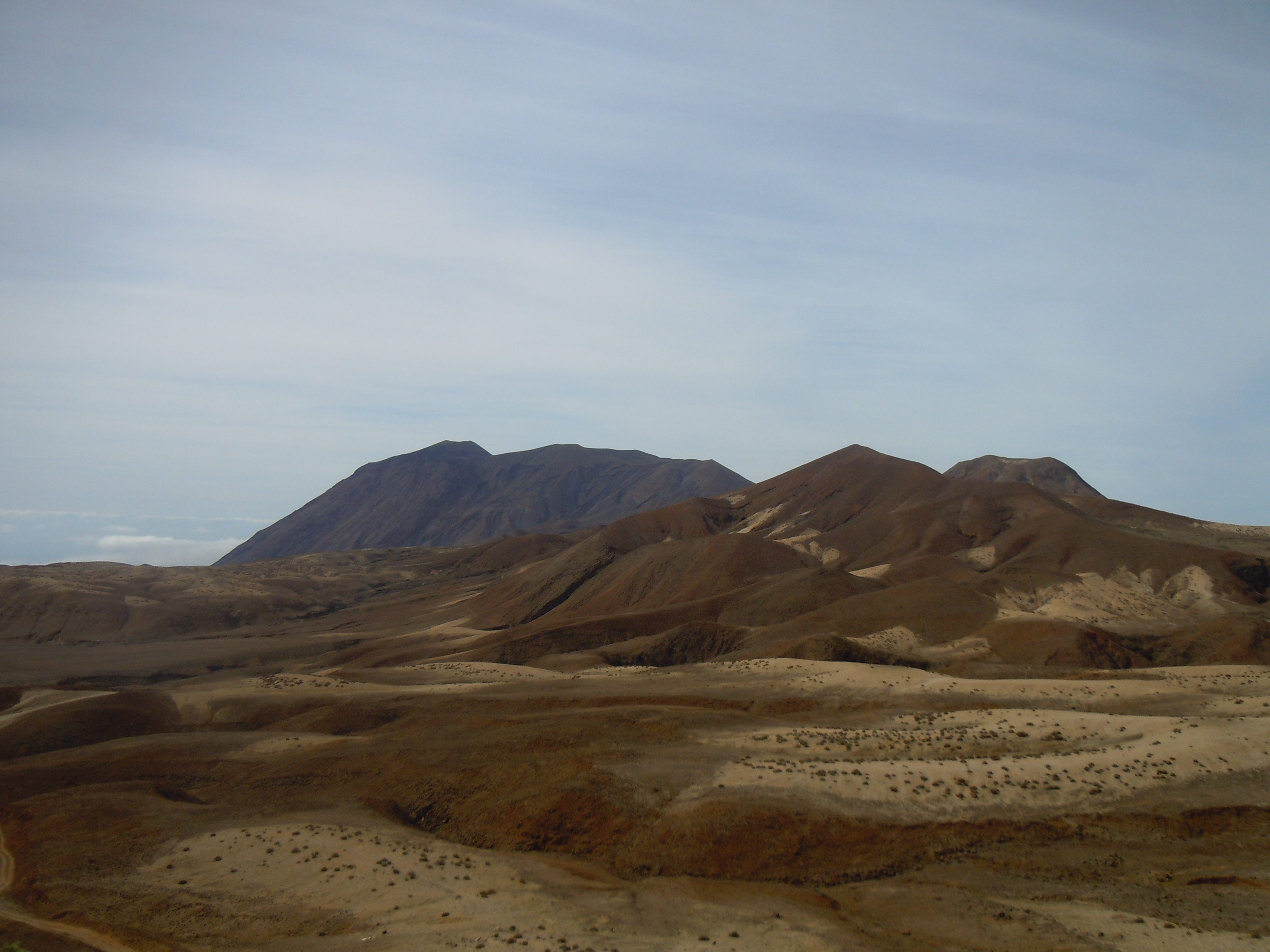 sommet du Topo da Coroa, ancien volcan de l'île de Santo Antao (Cap-Vert)